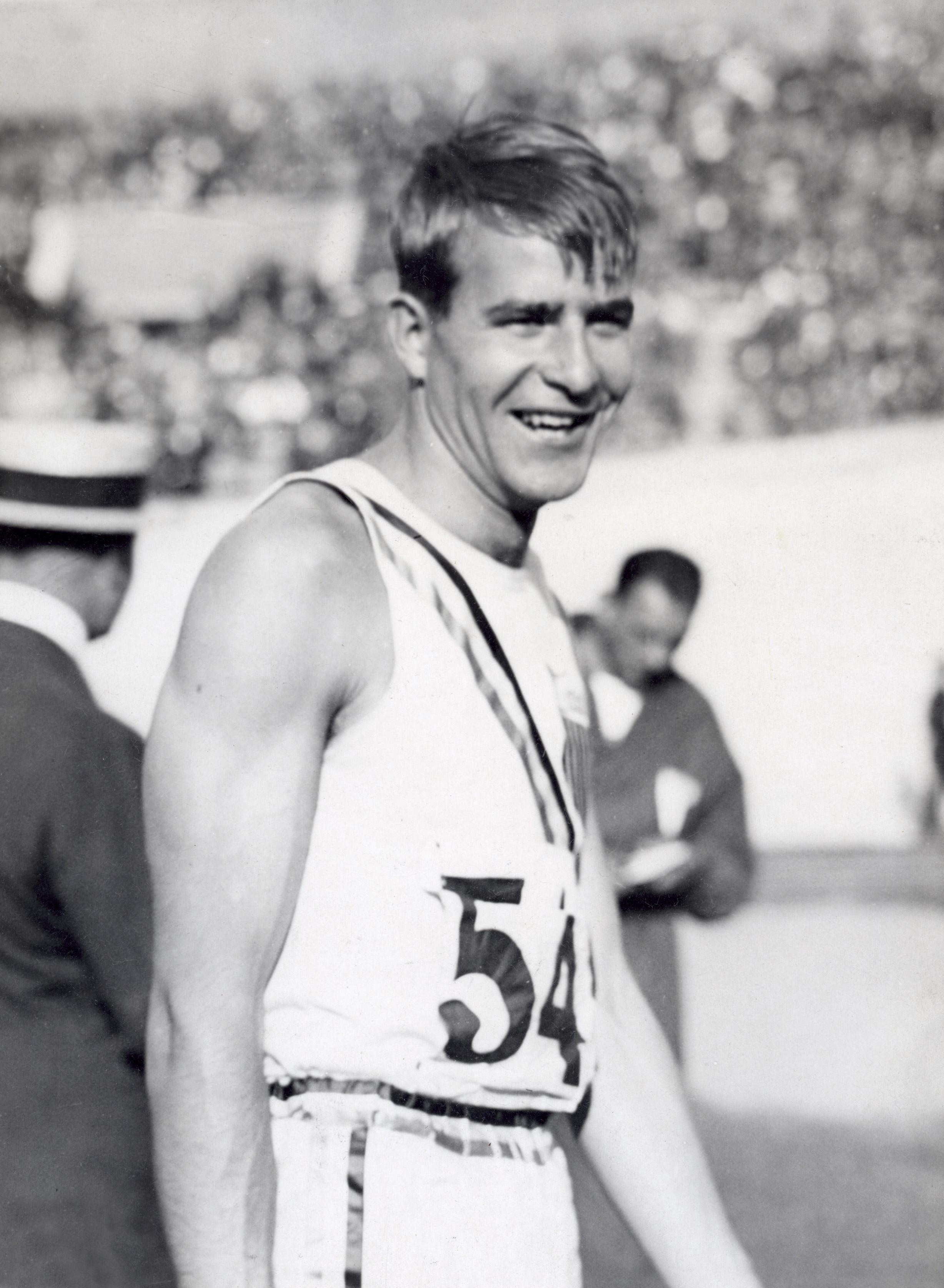 Sport, Olympische Spelen Amsterdam, 1928 : De Amerikaan Robert King, olympisch kampioen hoogspringen.